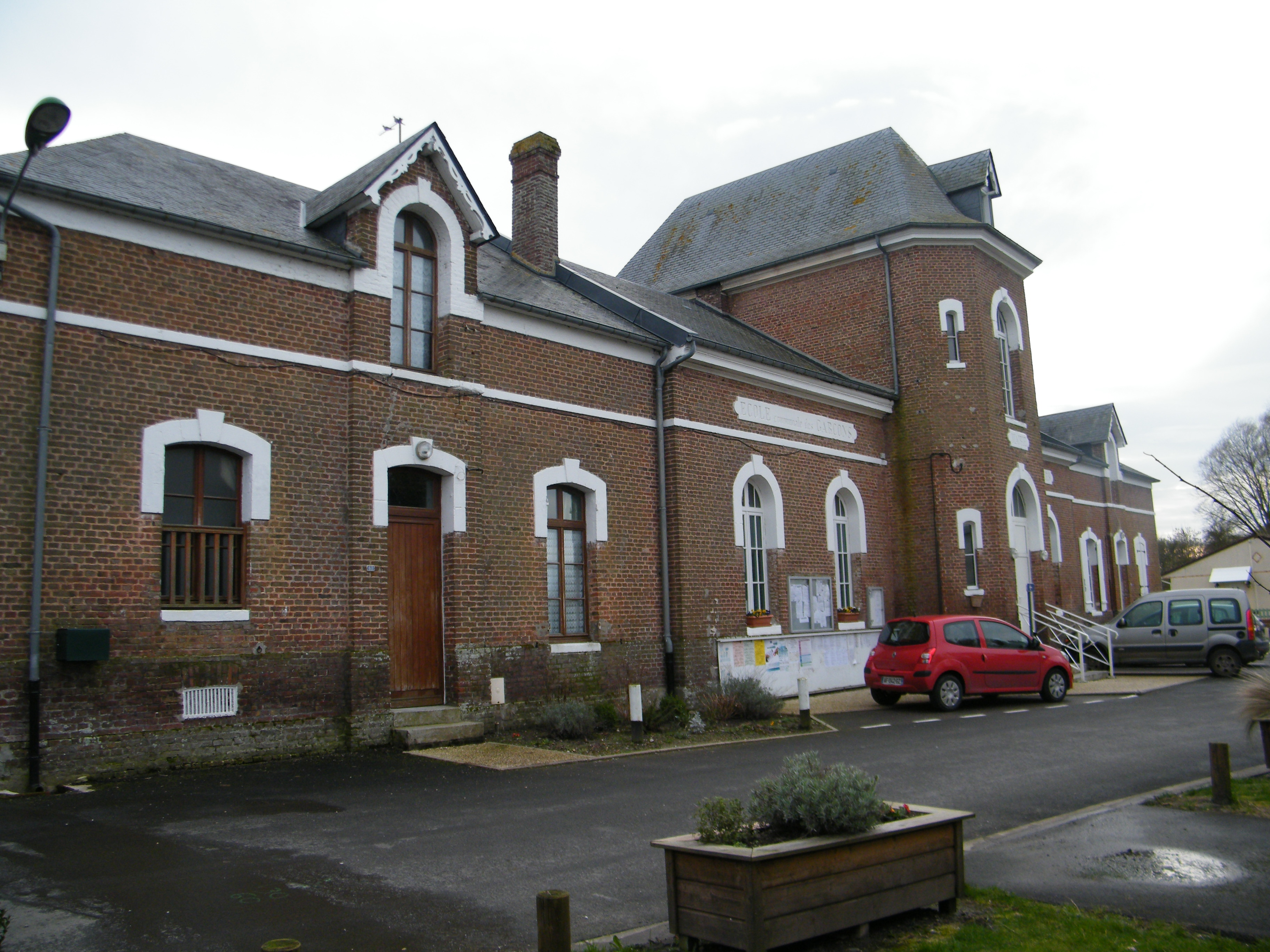 La mairie et l'ancienne école de Favières.